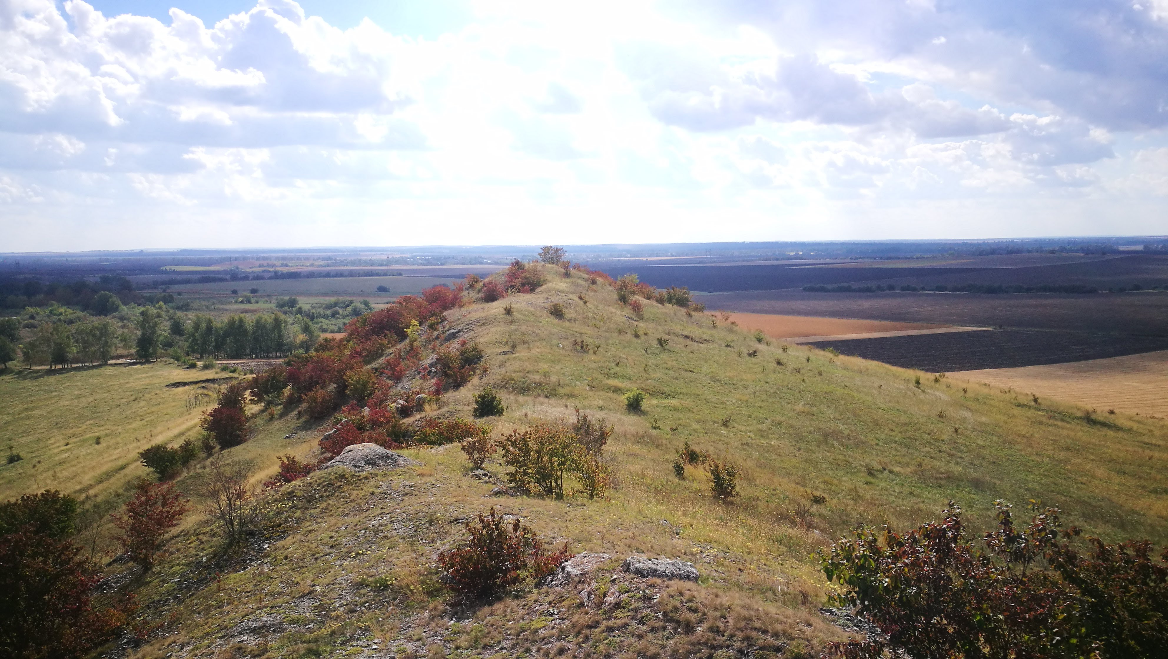 Товтра Садова та Деренова, Кам'янець-Подільський район, Циківський розсадник, кв. 9, діл. 9, кв. 10, діл. 5